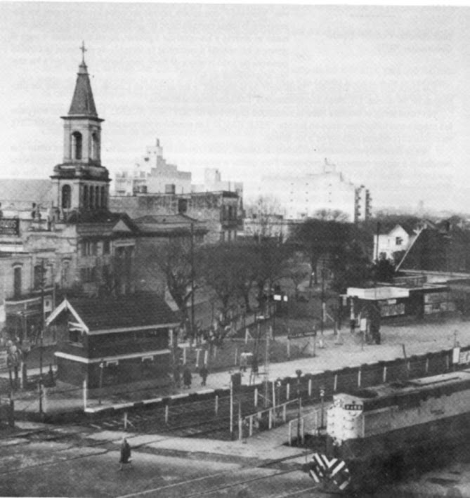 Vista de la intersección de la calle Cuenca con las vías del F.C. San Martín.